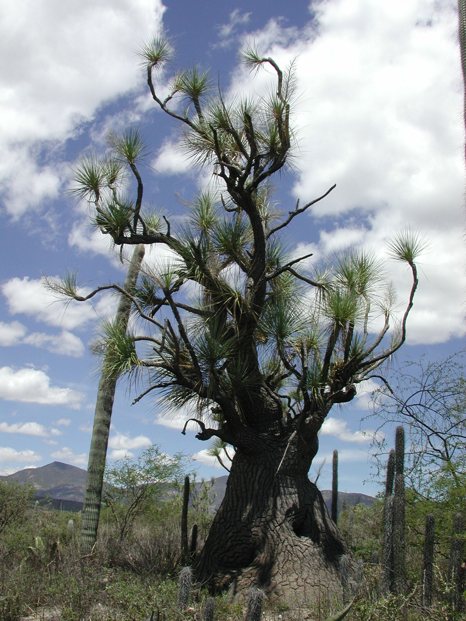 Adult specimen of Beaucarnea gracilis. By Zapotitlán Salinas, Oaxaca, México